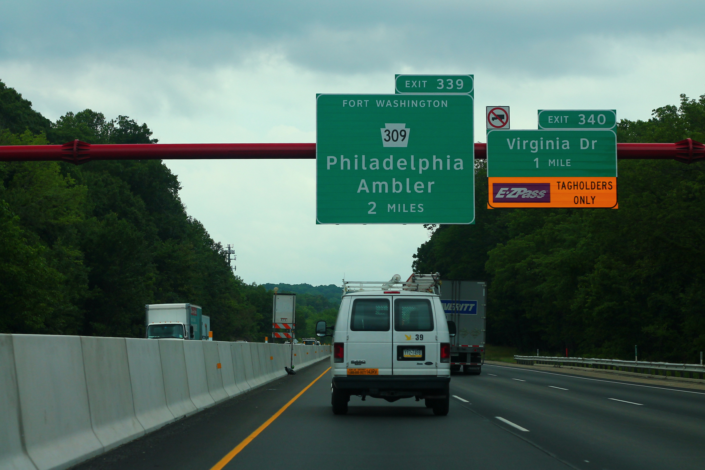 I-276 West - Exit 340-339 - Virginia Drive PA309